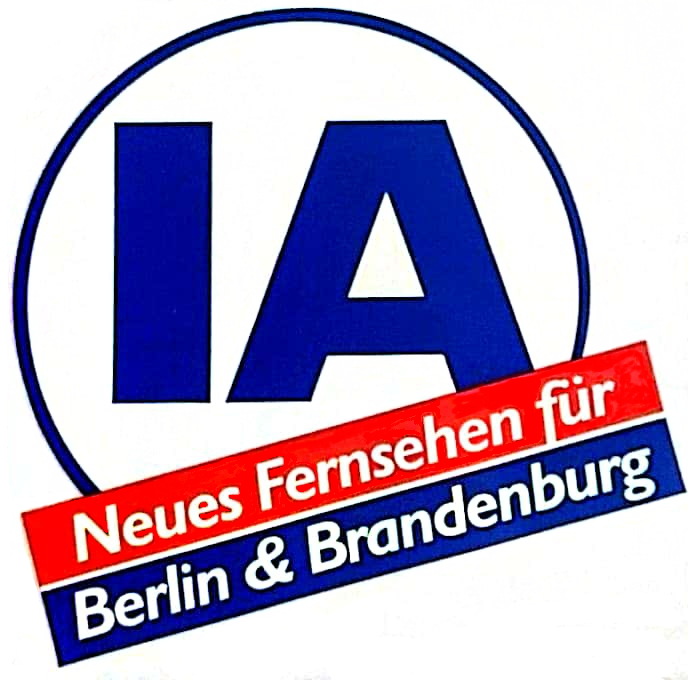 Senderlogo